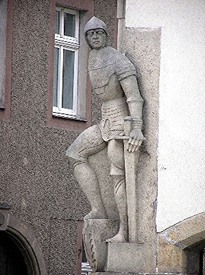 Skulptur des Ritter Jeschke am Burgkeller Dohna